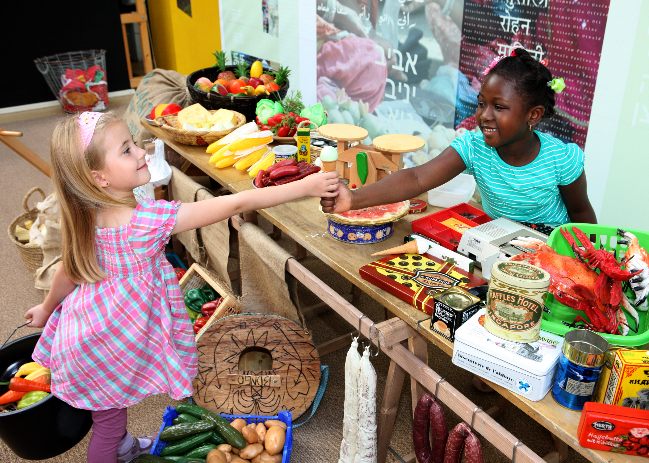 Das Bild zeigt den Marktplatz innerhalb der Ausstellung "Ganz weit weg und doch so nah" des Labyrinth Kindermuseums in Berlin